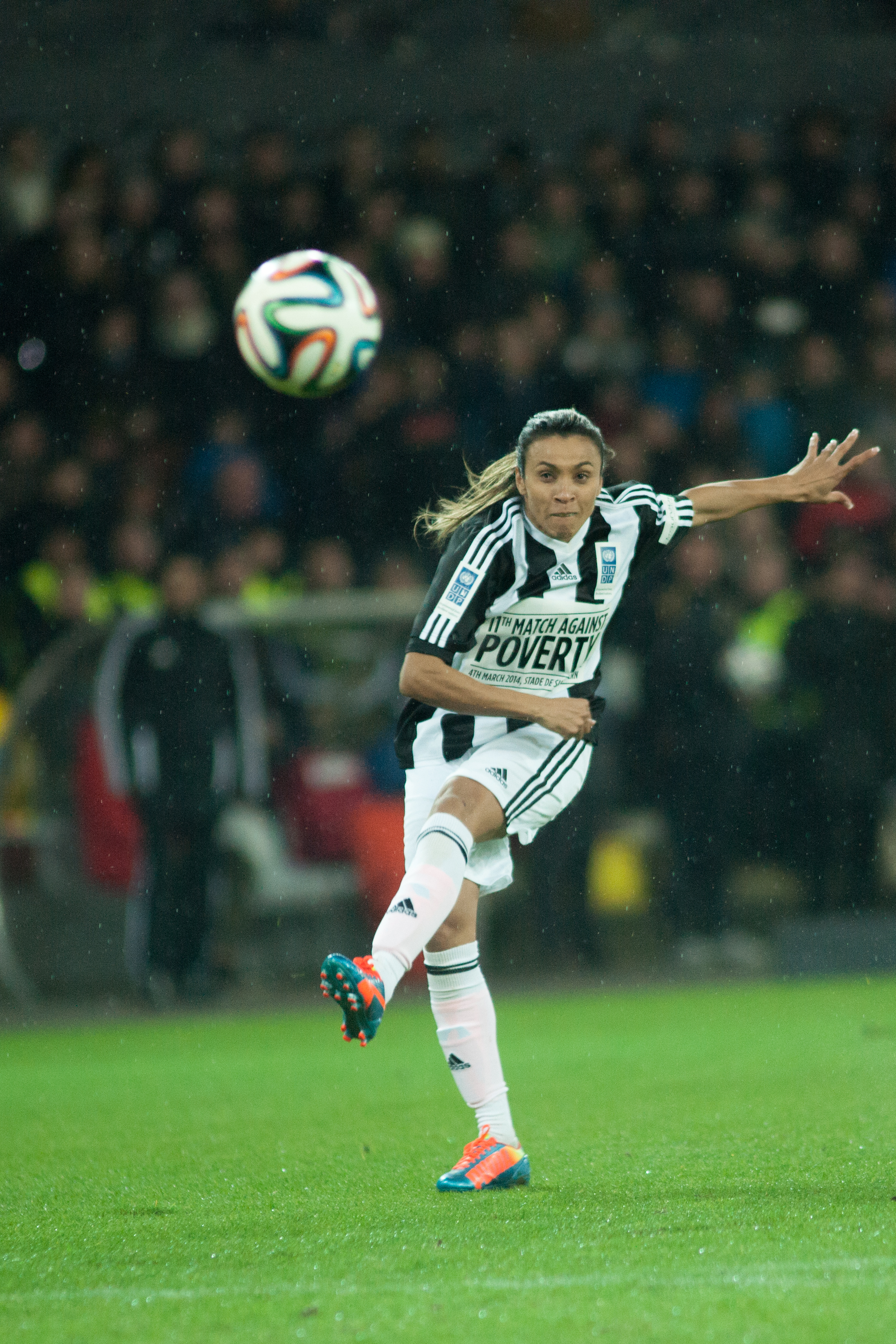 Football against poverty 2014 - Marta